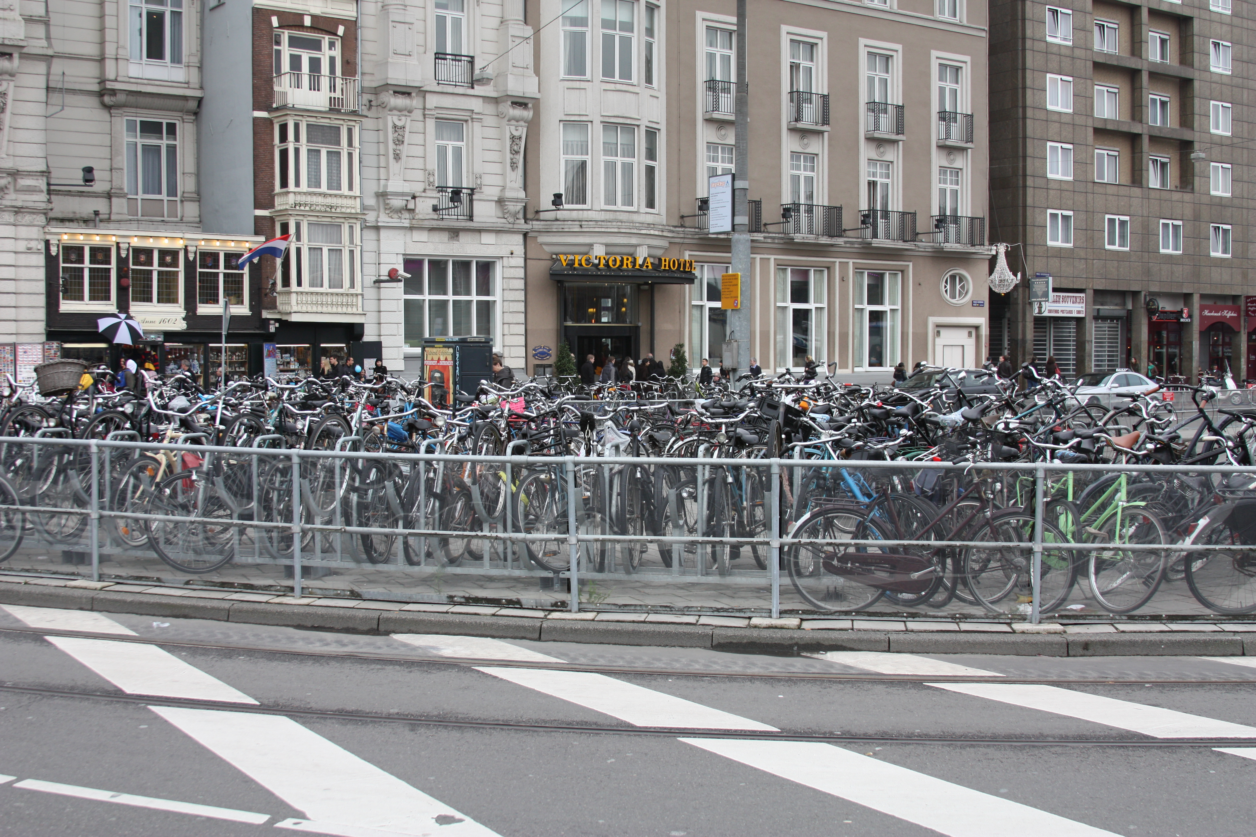 Amsterdam Zentrum